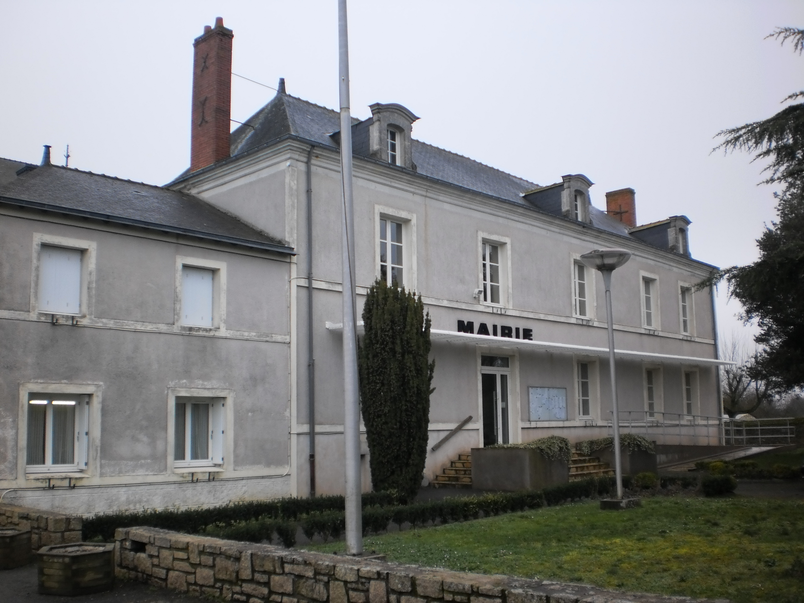 Belligné (Loire-Atlantique, France) - mairie